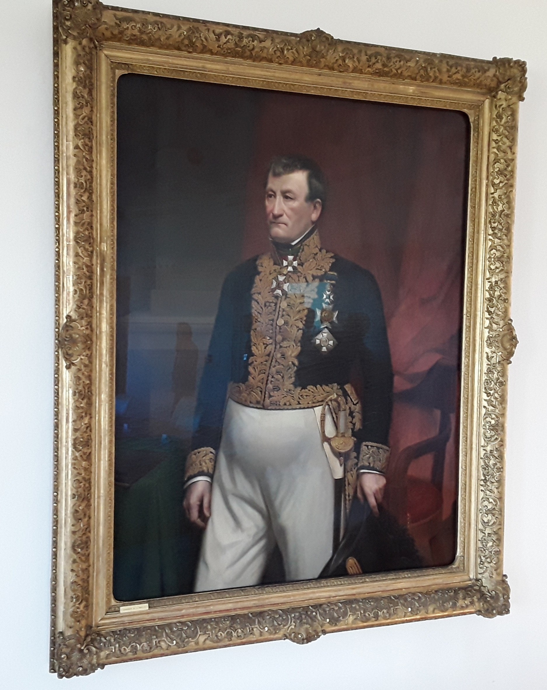 Gaspard-Théodore-Ignace de la Fontaine (*1787 - +1871), 1er Président du Conseil d'État (Luxembourg) de 1857 à 1868. Tableau peint par Jean-Baptiste Fresez. Donation aux Archives nationales par Madame Barbe de Lafontaine-Jungblut. Le tableau est acroché dans la salle pléniaire du Conseil d'état.